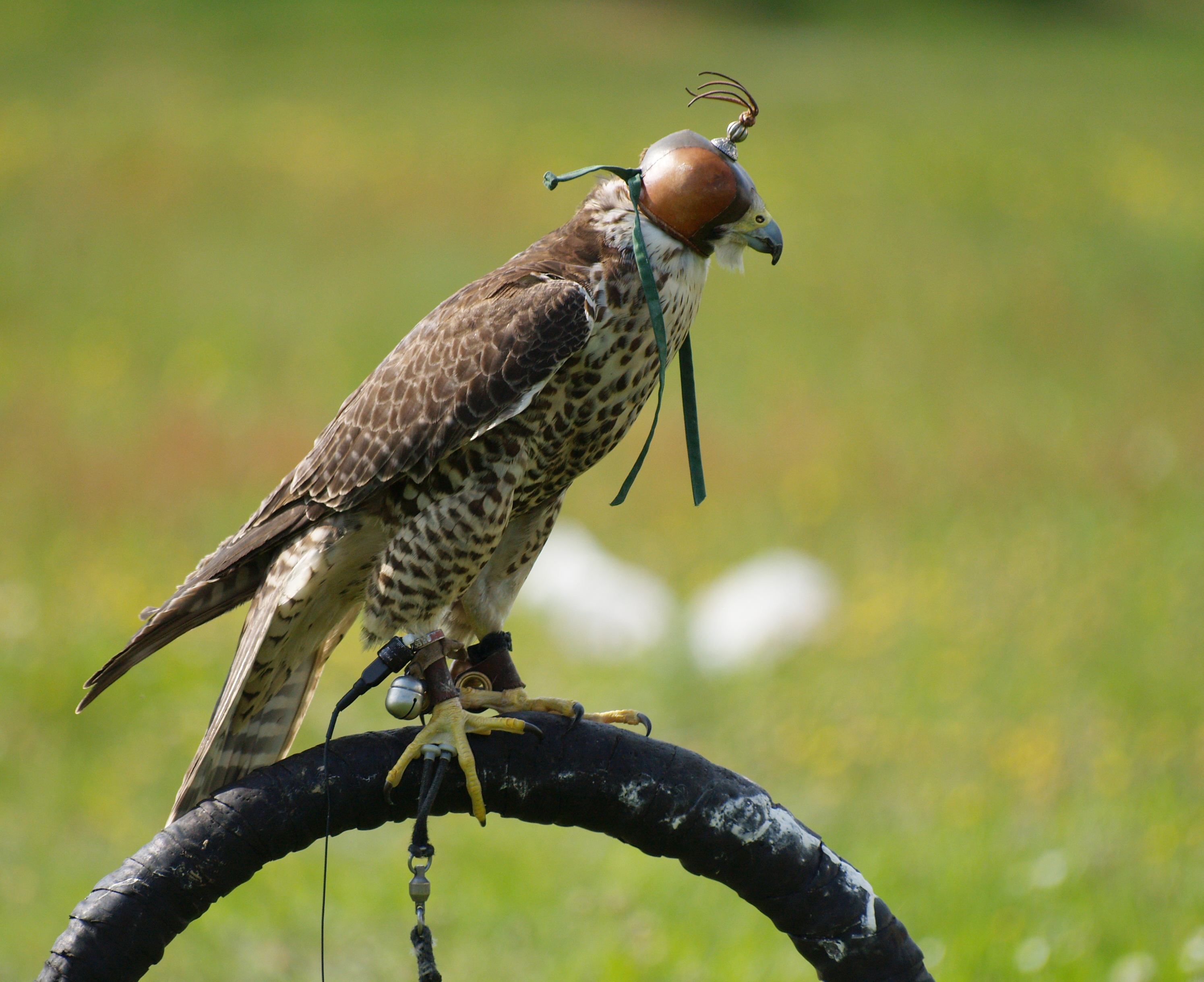 Ptak w pełnym sokolniczym rynsztunku.